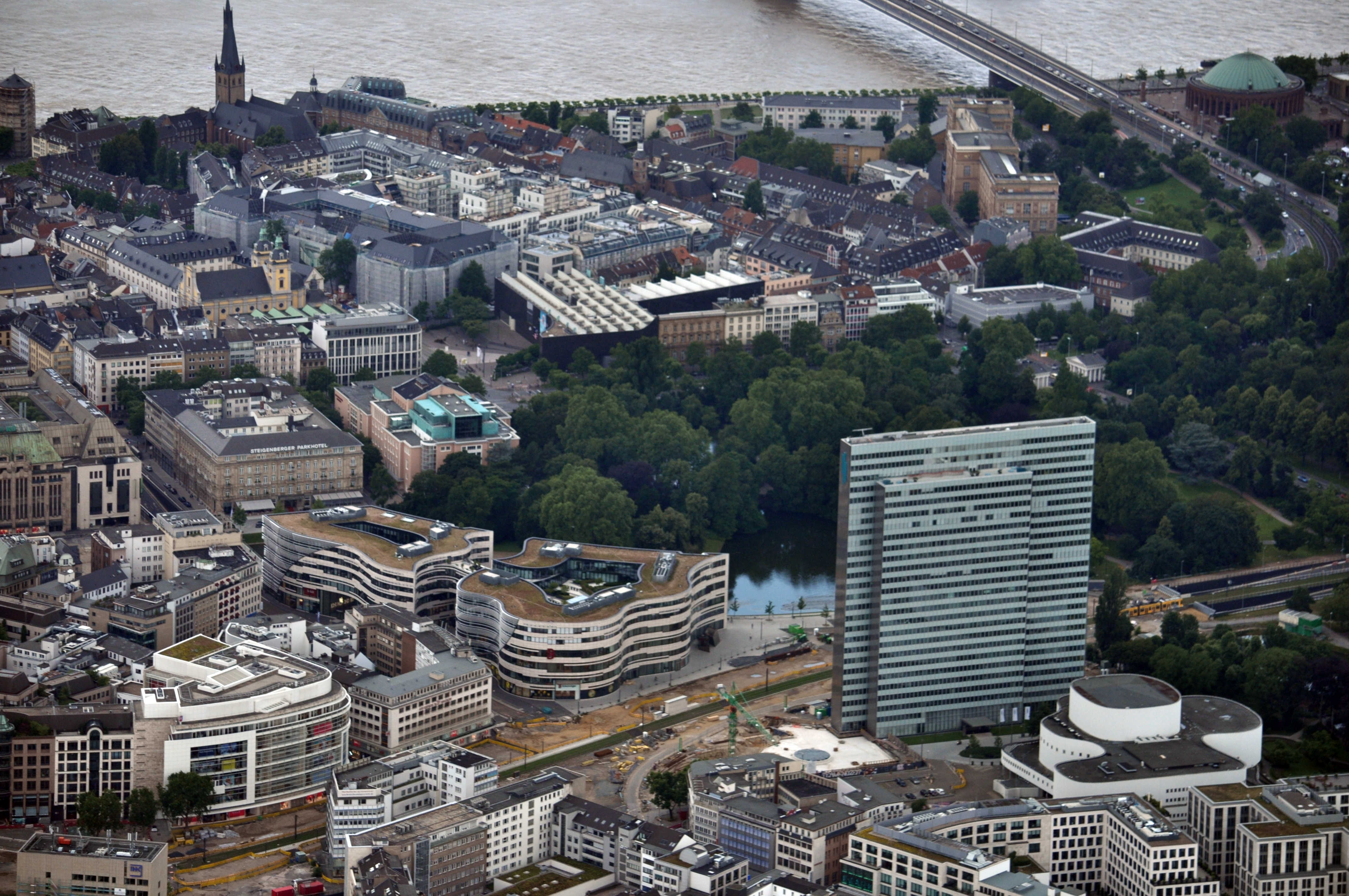 Kö-Bogen und 3-Scheiben-Haus in Düsseldorf. Rechts unten das Schauspielhaus; Oben links Altstadt mit Schlossturm und St. Lambertus; rechts oben die Tonhalle an der Oberkassler Brücke. Luftbild aus ca. 600m Höhe über Grund